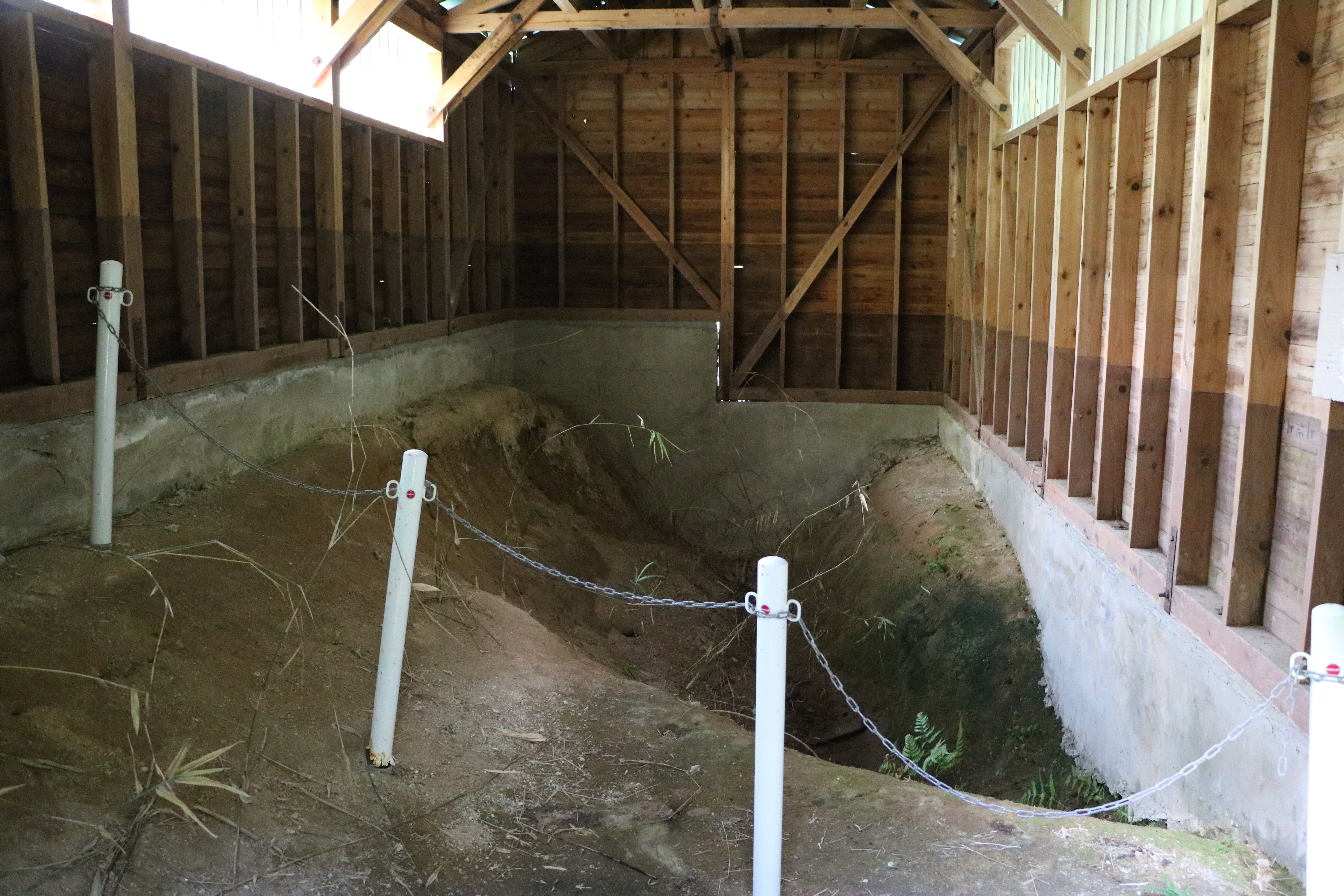 郷村断層生野内地区（国指定天然記念物、京都府京丹後市）